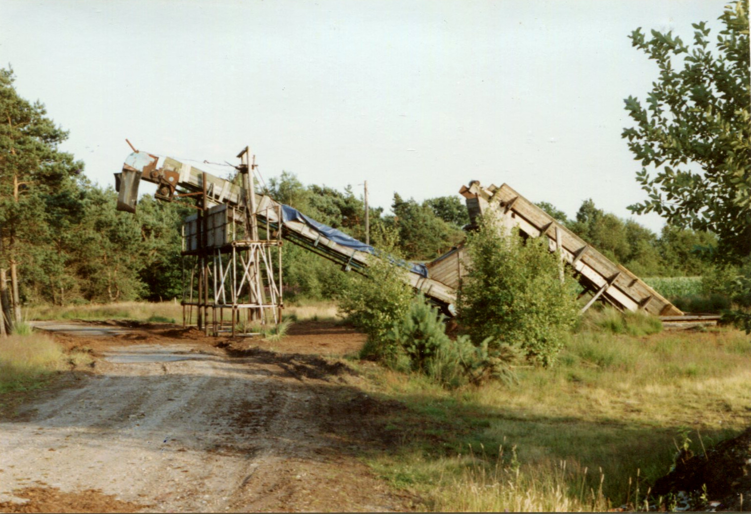 Die Torfverladestation im Torfmoor bei Sittensen im Sommer 1990.